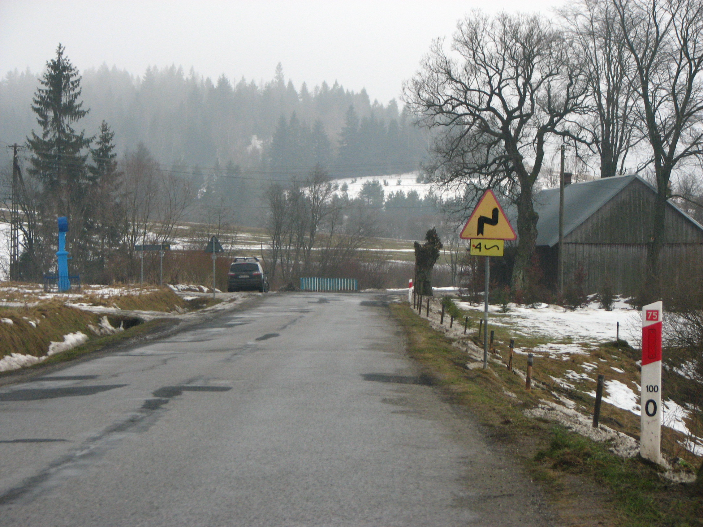 Droga krajowa nr 75. Wyjazd z Mochnaczki w stronę Tylicza. Najbardziej zdegradowany odcinek DK75.